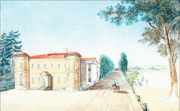 Усадьба Гудовичей в селе Поливаново